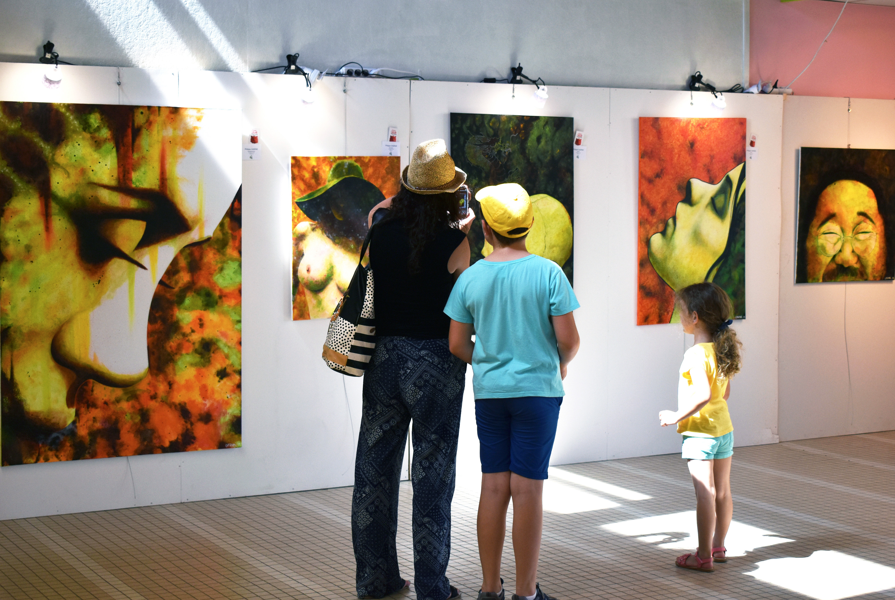 Deuxième édition du festival des Décades de la peinture, oeuvres de Philippe Caspar, artiste peintre émergent originaire de Strasbourg, vivant et travaillant en Auvergne.